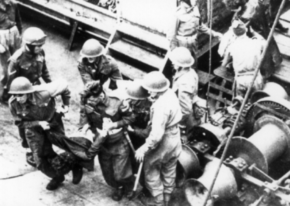 פלי"ם ספינות המעפילים ג - אקסודוס - ספינות המעפילים – אקסודוס יציאת אירופה תשז - אולטימטום- הורדת המעפילים בהמבורג .. מרדכי רוזמן מורד בכוח ע"י חיילים